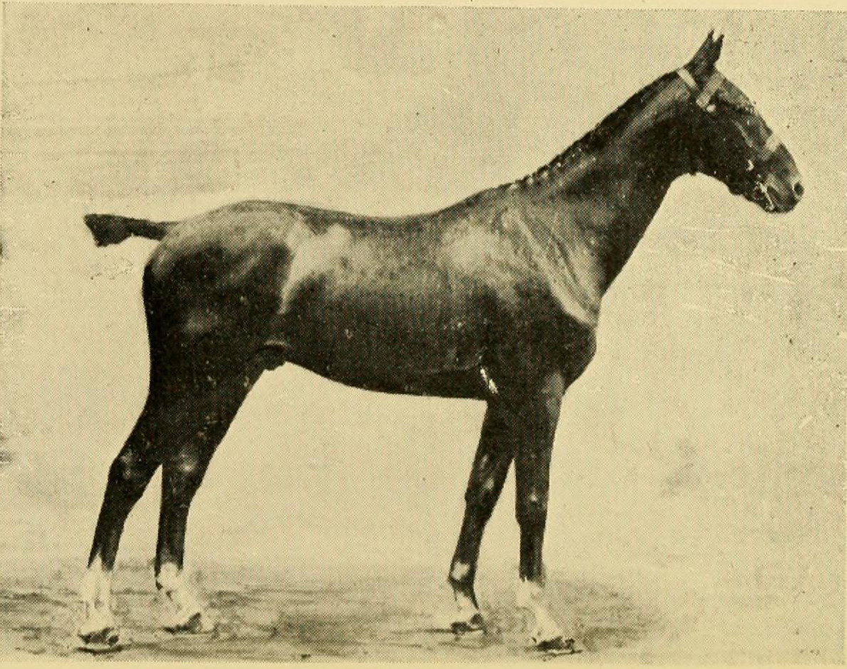 Favori, demi-sang charolais, par Riberon, pur sang (champion de la société du cheval de guerre)